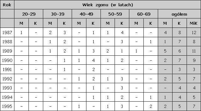 Śmierć z powodu kuru w latach 1987-1995 według płci i wieku